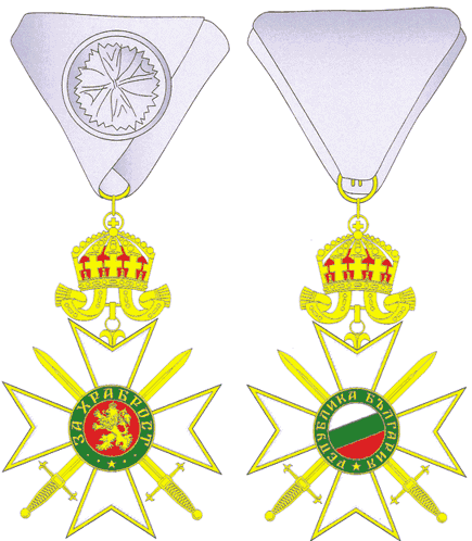 Орден "За Храброст" I степен с мечове